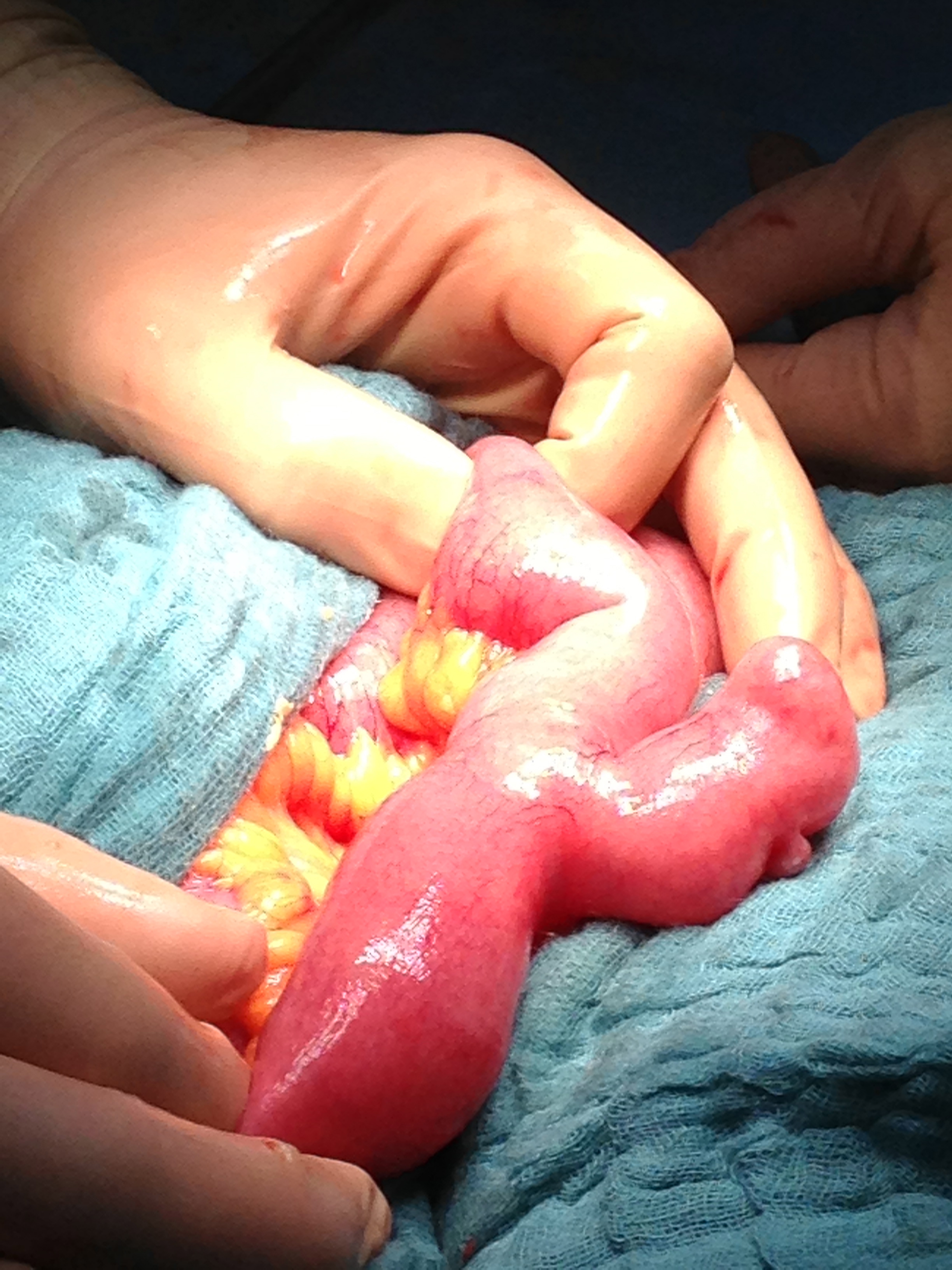 Ein mit 6 cm relativ langes Meckel-Divertikel, im Verlauf des Ileums, ca. 60 cm vor der Bauhinschen Klappe. Zufallsbefund während einer Operation wegen eines mechanischen Ileus.